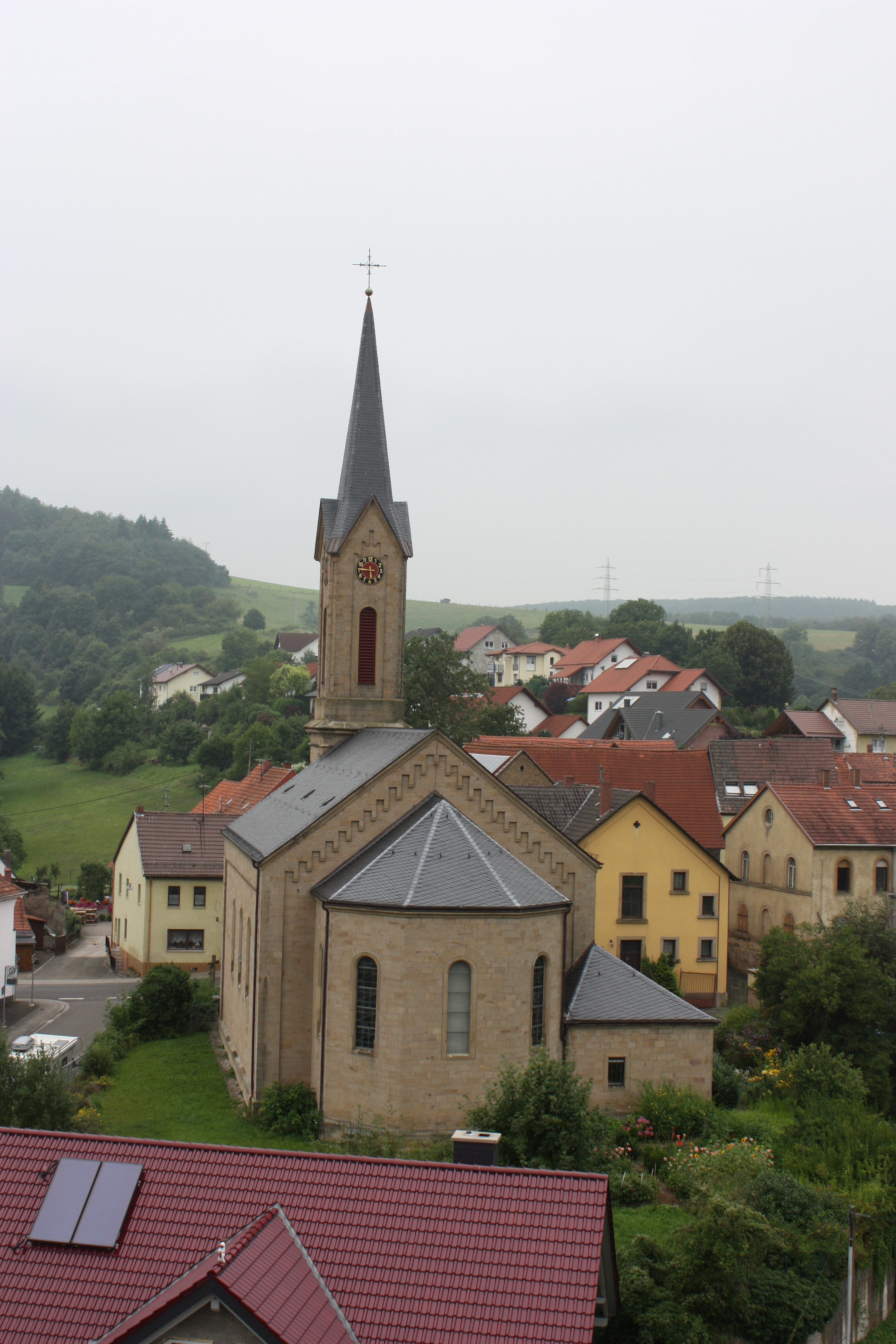 Die St. Johannes Nepomuk Pfarrkirche (Rückseite)